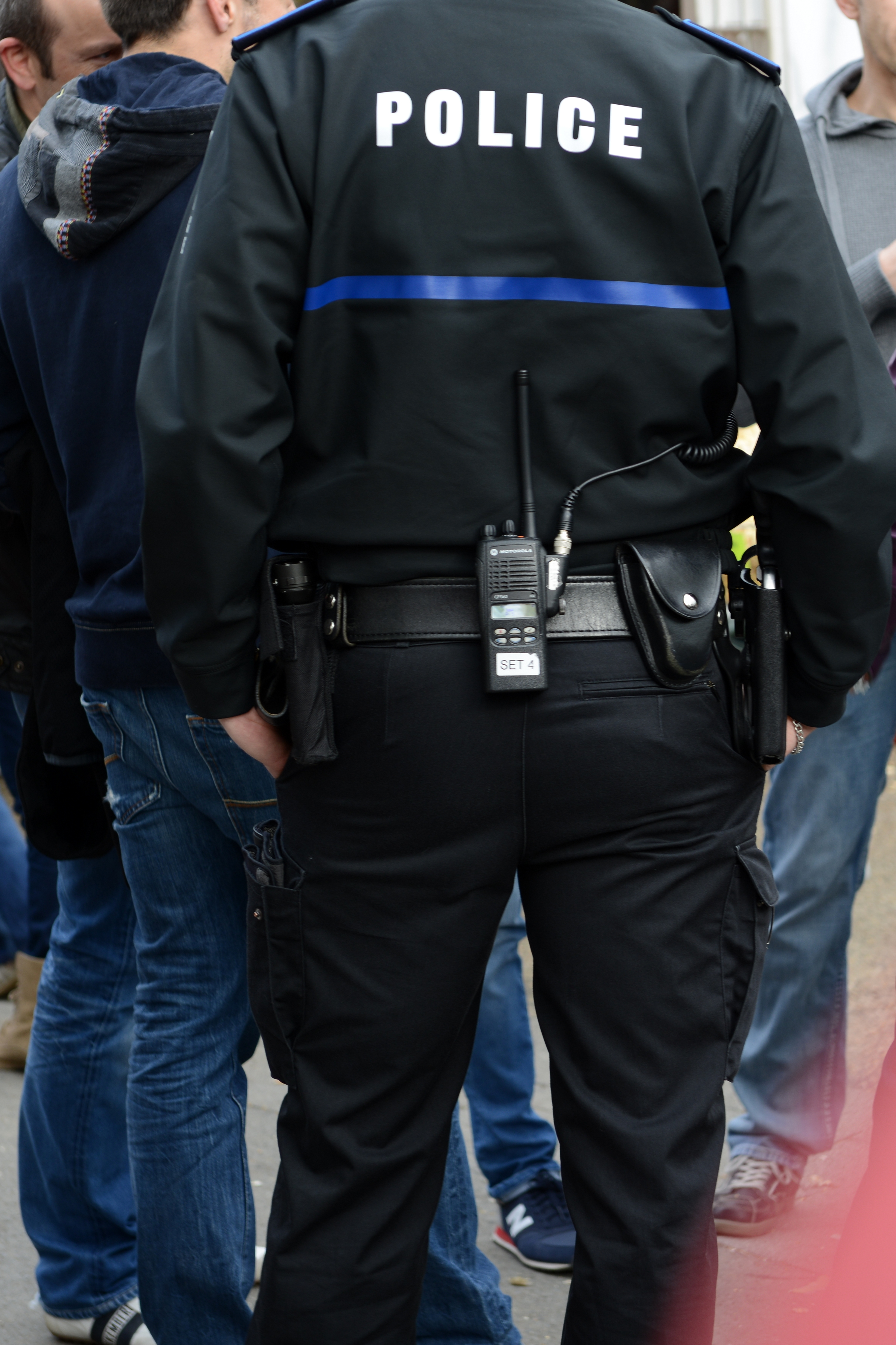 D'Police grand-ducale (2013).